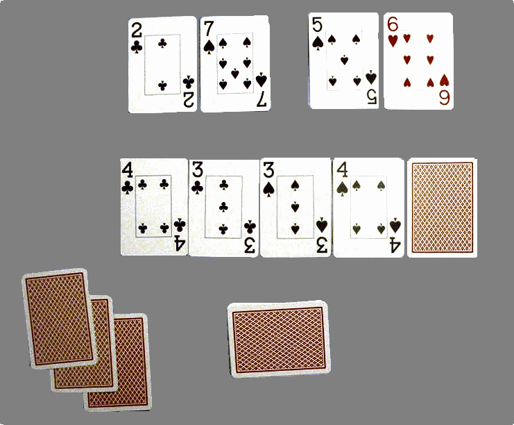 Paradoxon beim Kartenspiel Poker